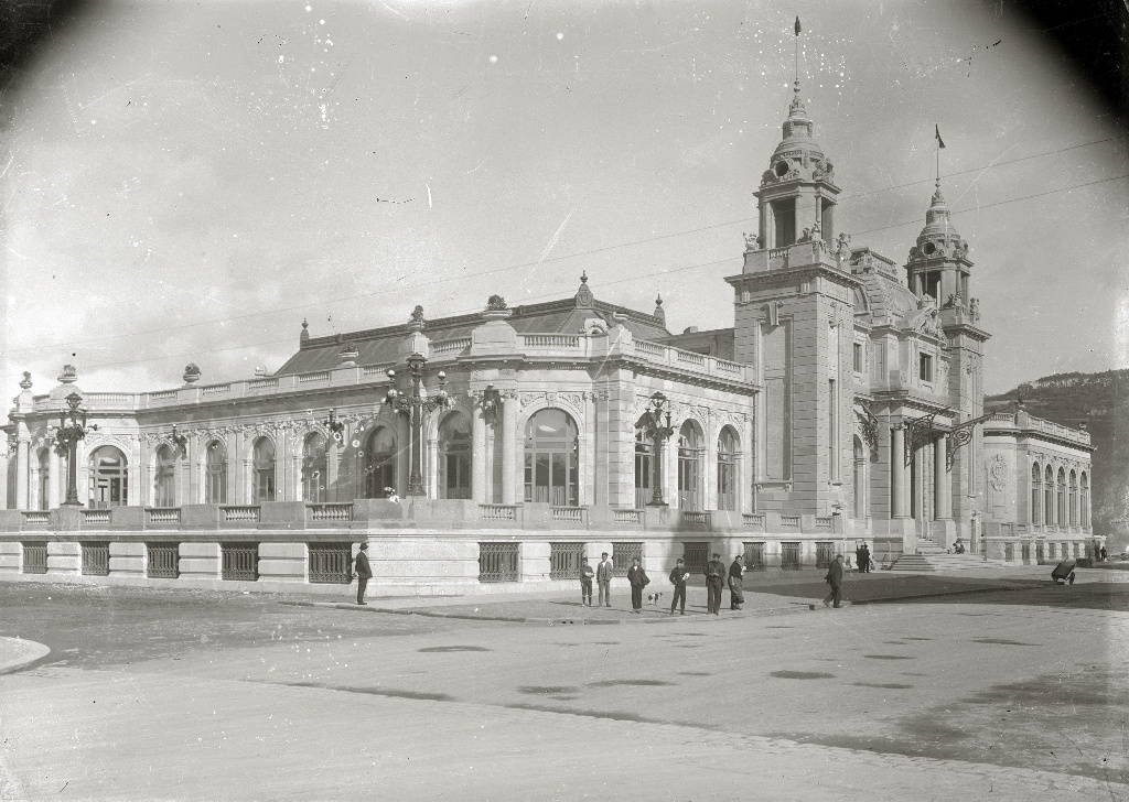 Edificio del Casino Gran Kursaal, en San Sebastián (España)